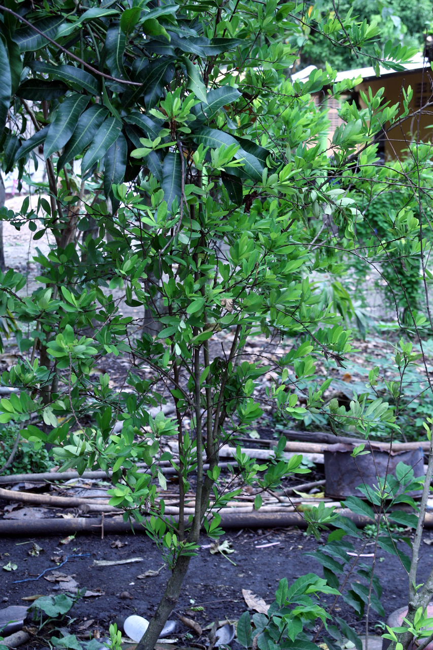 Arbre coca à Tolima (Colombie)